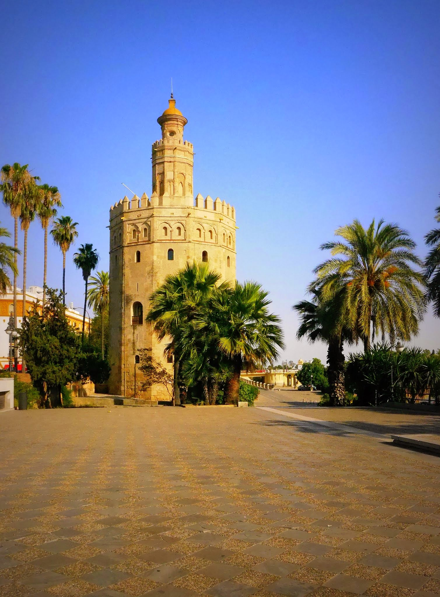 Torre del Oro in Sevilla This work by Ronny Siegel is licensed under a Creative Commons Attribution 4.0 International License. - You can freely use this work, any way you want including altering and/or selling if you call my name on your publication. You can find this picture also on my website